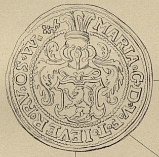 Danieltaler der Herrschaft Jever o. J., Vorderseite